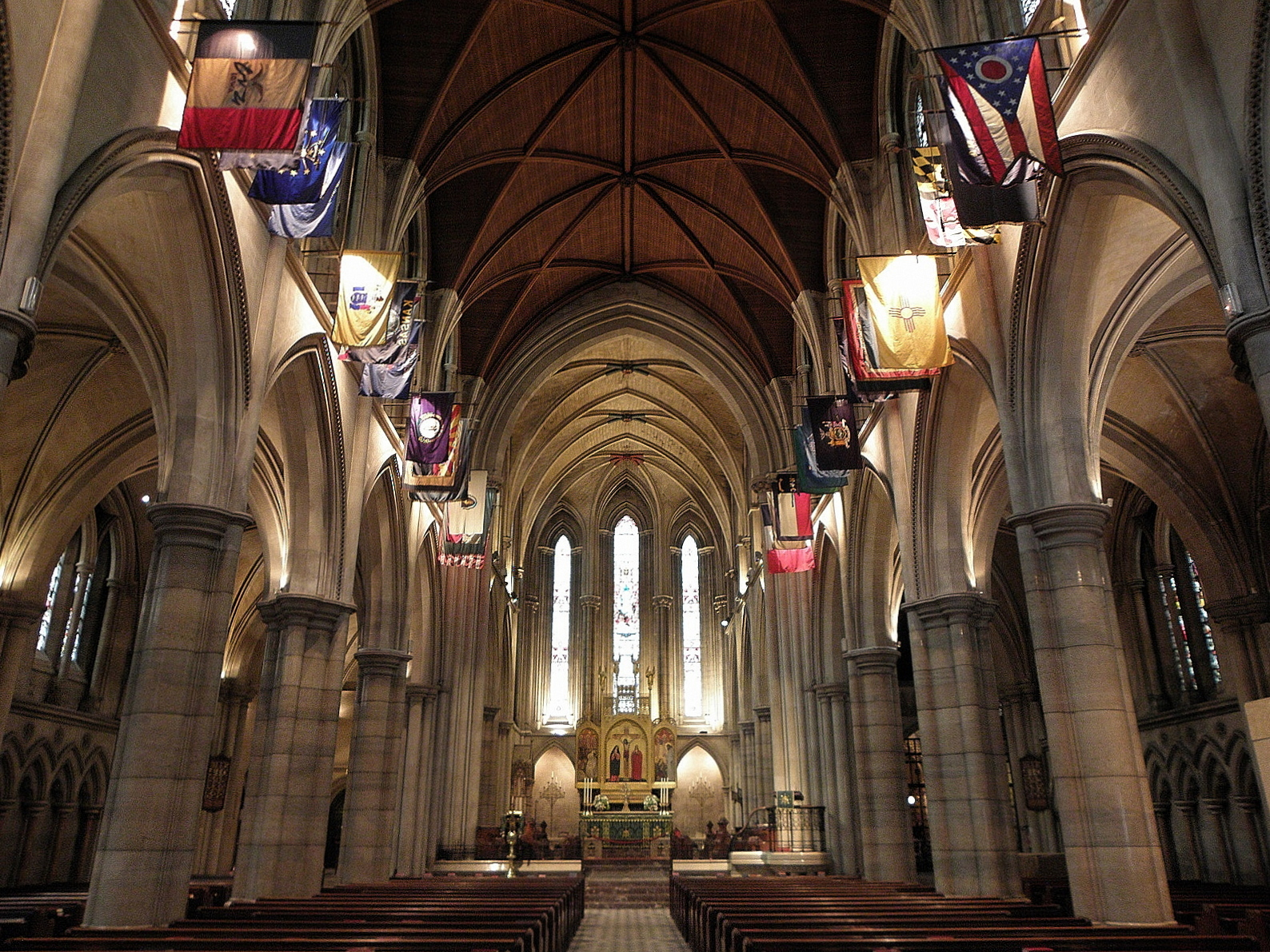 Nef principale et collatéraux de la cathédrale américaine de Paris (75).